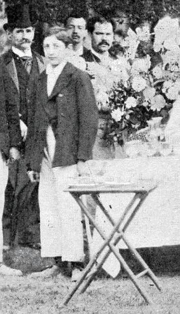 Marcel Vacherot, champion interscolaire de l'Union en double, en mai 1896 (à gauche son père, avec un chapeau).